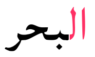 واژه بحر برای نشان دادن کاربرد های گوناگون "ال" در زبان عربی